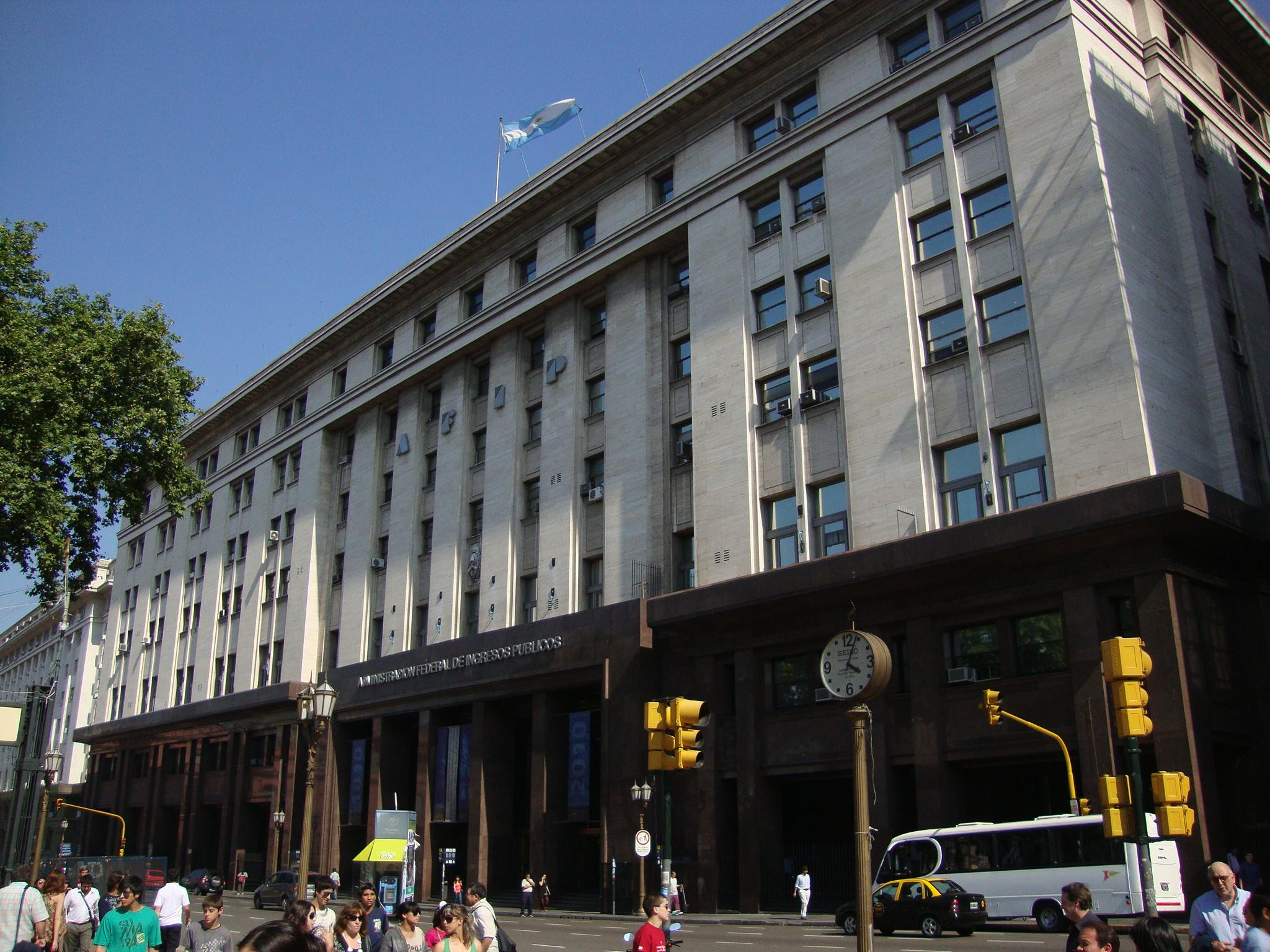 Edificio de la Administración Federal de Ingresos Públicos. Proyectada originalmente en 1943 por los arquitectos Raúl Fitte y Héctor Morelli, el diseño fue modificado en 1949 por el arquitecto Héctor Fariña Rice. Como la manzana estaba dividida en varios terrenos, fueron comprados progresivamente, y la última etapa se terminó recién hacia 1966. Luego fue Ministerio de Bienestar Social. En 1997 adquirió su función actual, al privatizarse el Banco Hipotecario. Actualmente piense rebautizarse como Edificio Guichandut . Calle Hipólito Yrigoyen 370, Buenos Aires (Argentina).